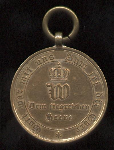 Deutsches Reich, Kriegsdenkmünze 1870-71, Kämpfer, Vorderseite